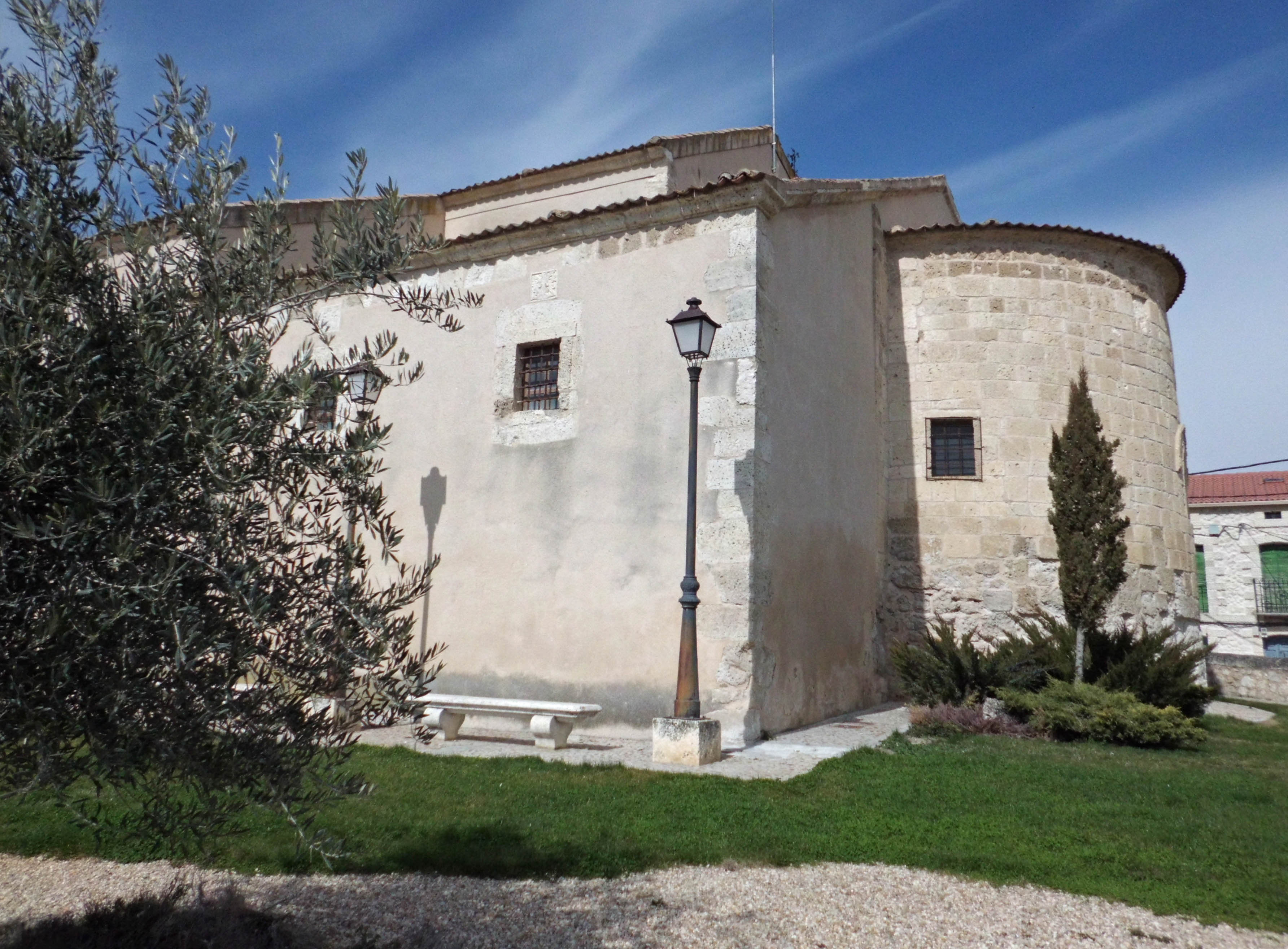 Iglesia de Santa Marina en Sacramenia (Segovia, España).